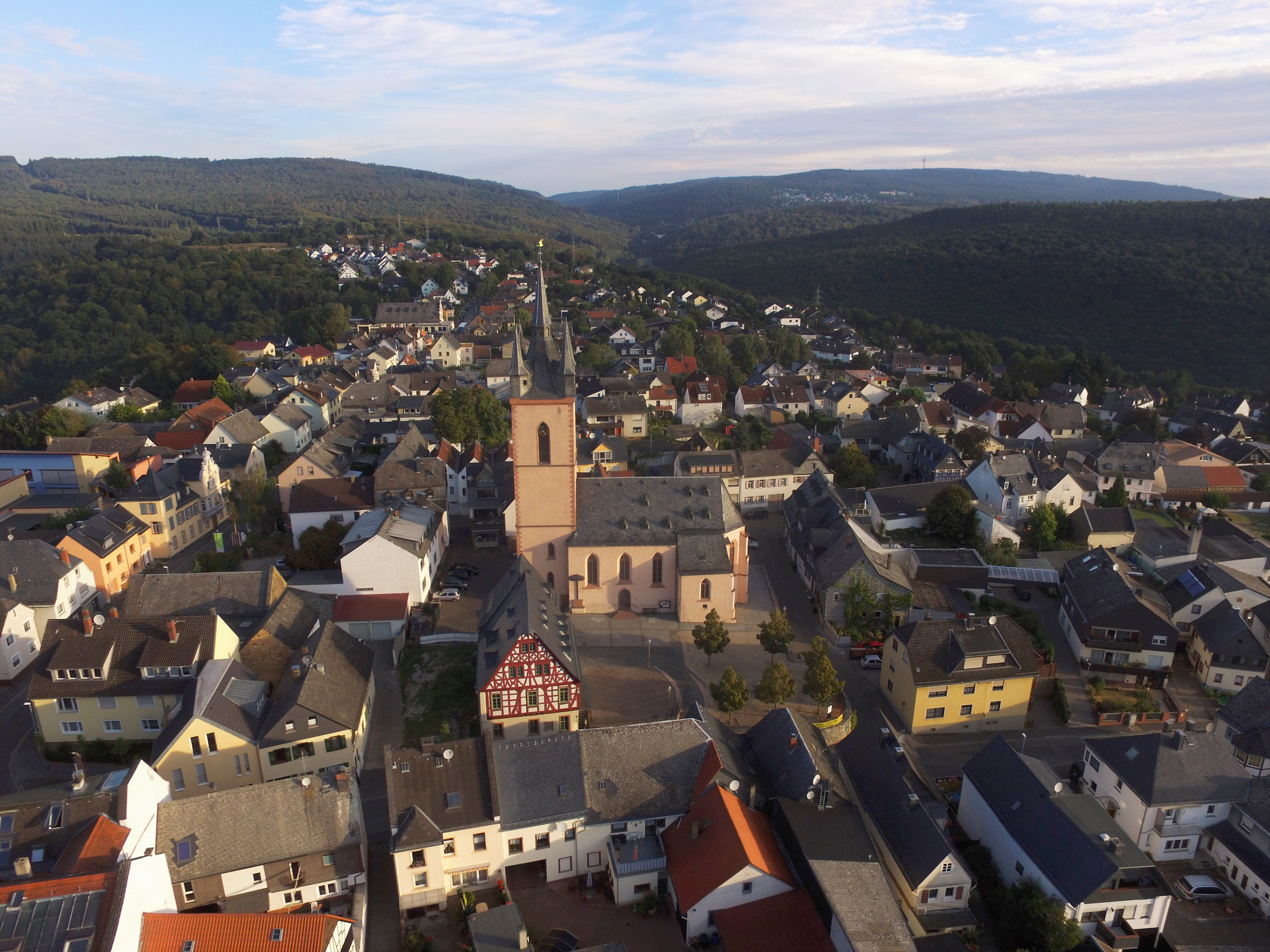 Rauenthal aus ca. 150 Meter höhe. Mittig zu sehen: Die Rauenthaler Kirche umgeben von Häusern.